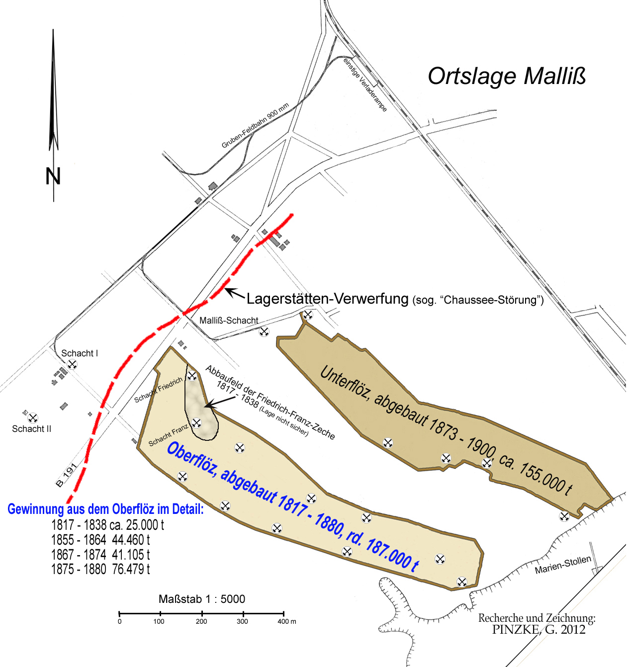 Übersicht über einen Teil des Braunkohlenfeldes Malliß